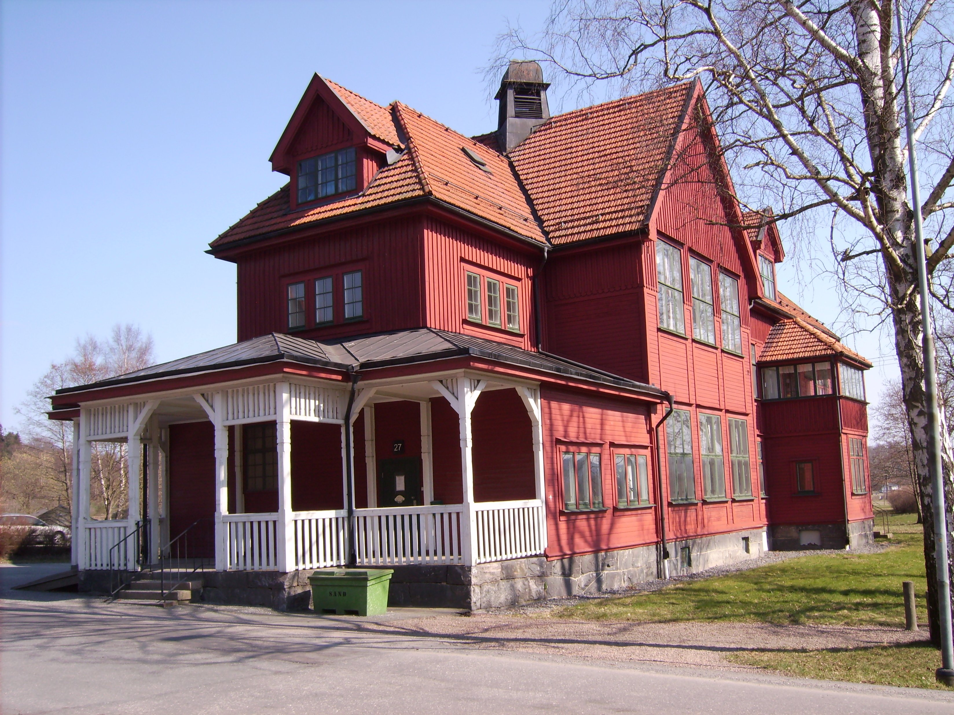 Bilden är fotograferad av Harri Blomberg. Photo by Harri Blomberg. Byggnaden användes som marketanteri under min militärtjänstgöring 1977 - 1978 (Per Antonsson)